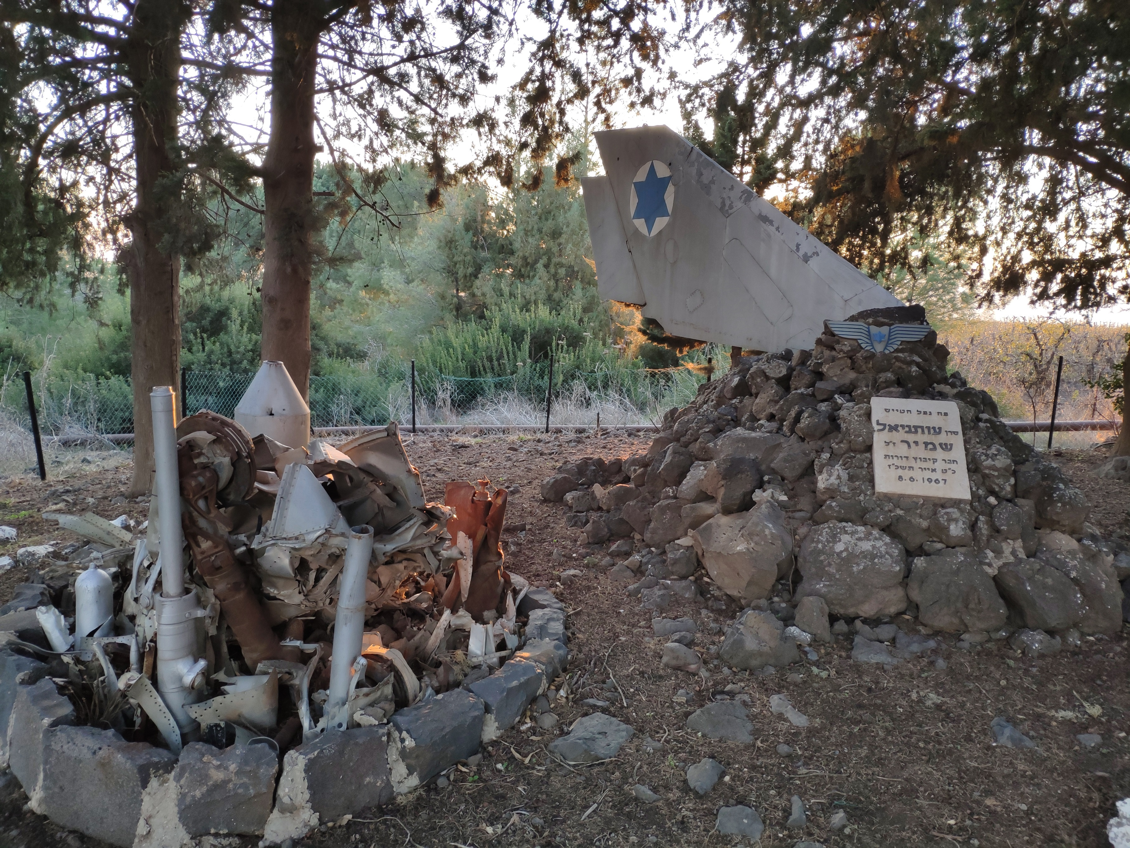 אנדרטה לזכר הטייס עותניאל שמיר ליד קדמת צבי